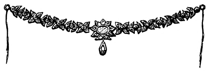 Diadème (ou ferronnière) algérien, formé de rosettes d'or incrustées de pierres précieuses (e.g. diamants, émeraudes). Origine et lieu de production : Alger, Algérie.